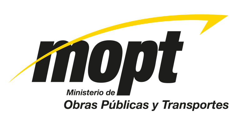 Logo del Ministerio de Obras Públicas y Transportes (MOPT), Costa Rica.